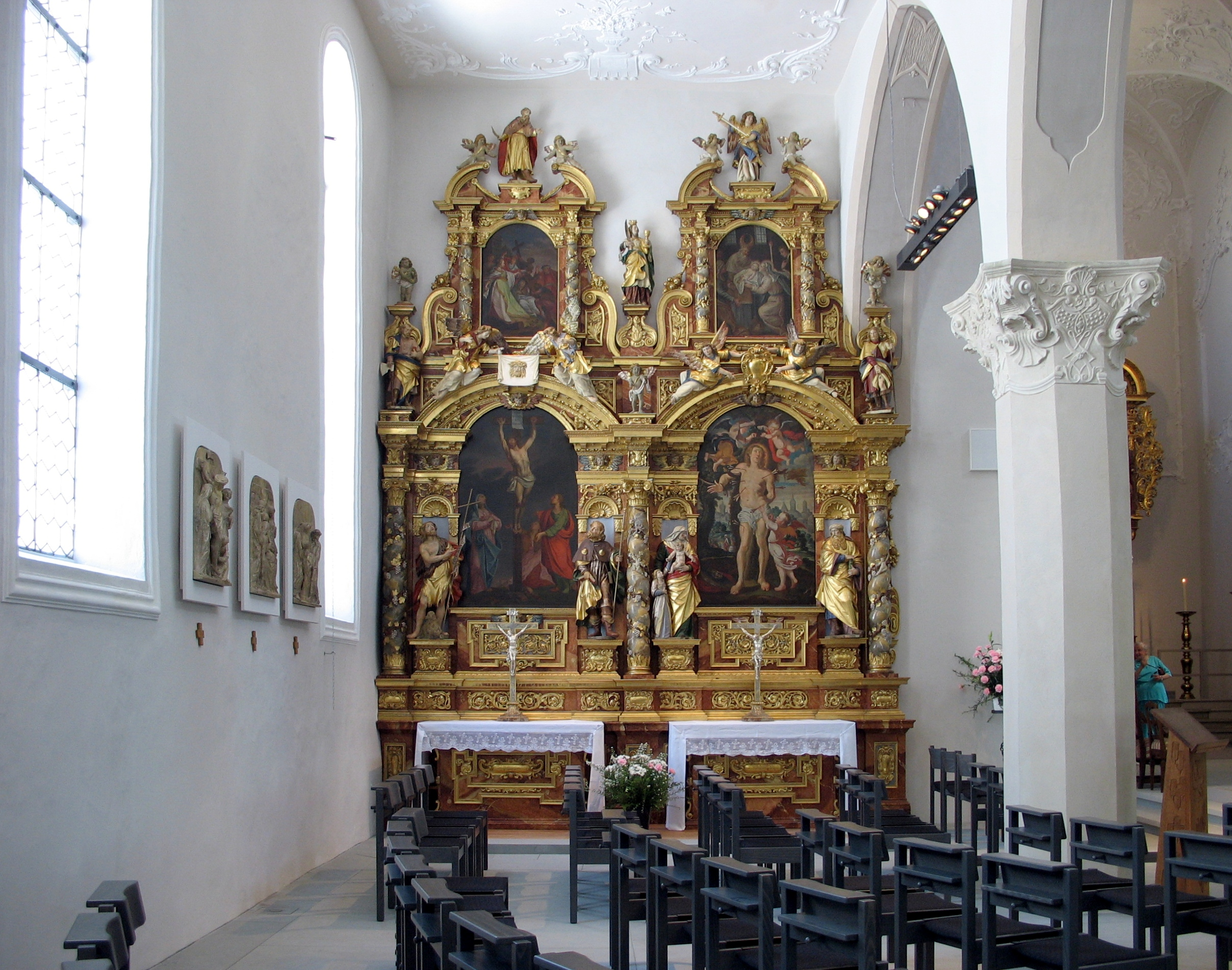 Konstanz, Dreifaltigkeitskirche, Doppelaltar im nördlichen Seitenschiff